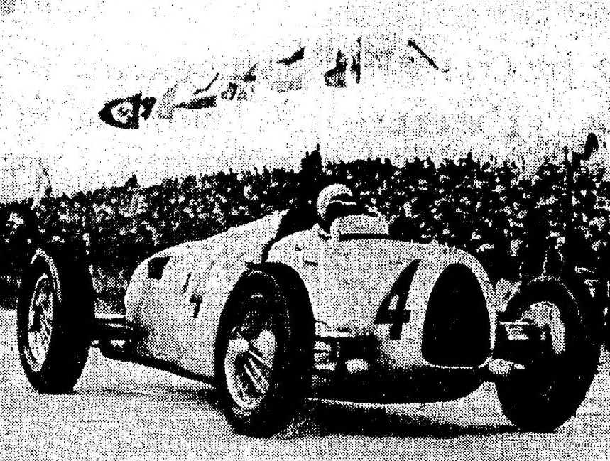 Bernd Rosemeyer, au Nurburgring pour une victoire à l' l'Eifelrennen en 1936.